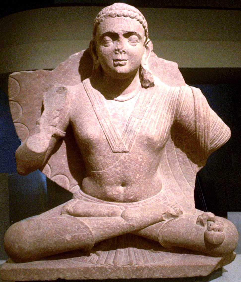 Mathura, siglo II. The Bodhisatva Maitreya, art of Mathura, 2nd century CE. Personal photograph, at Musée Guimet, 2004. Released in the Public Domain.